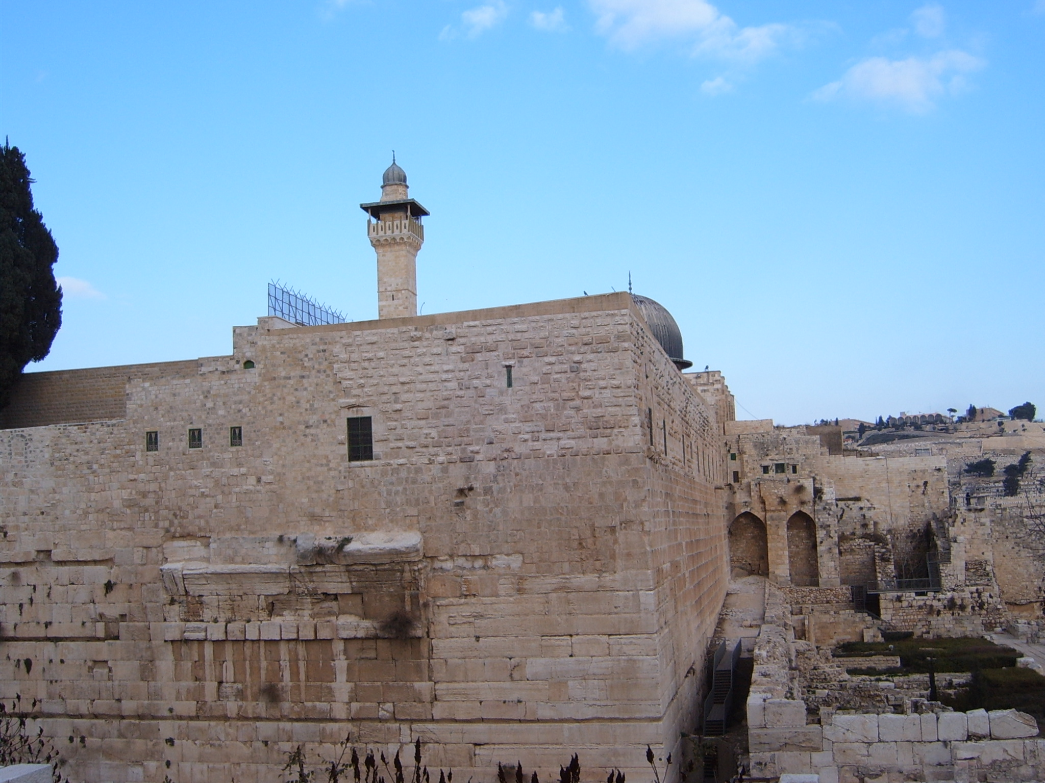 S3700034 Jerusalem